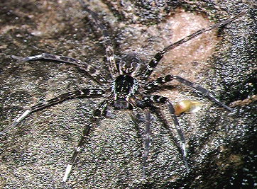 juvenile Dolomedes yawatai from Okinawa.